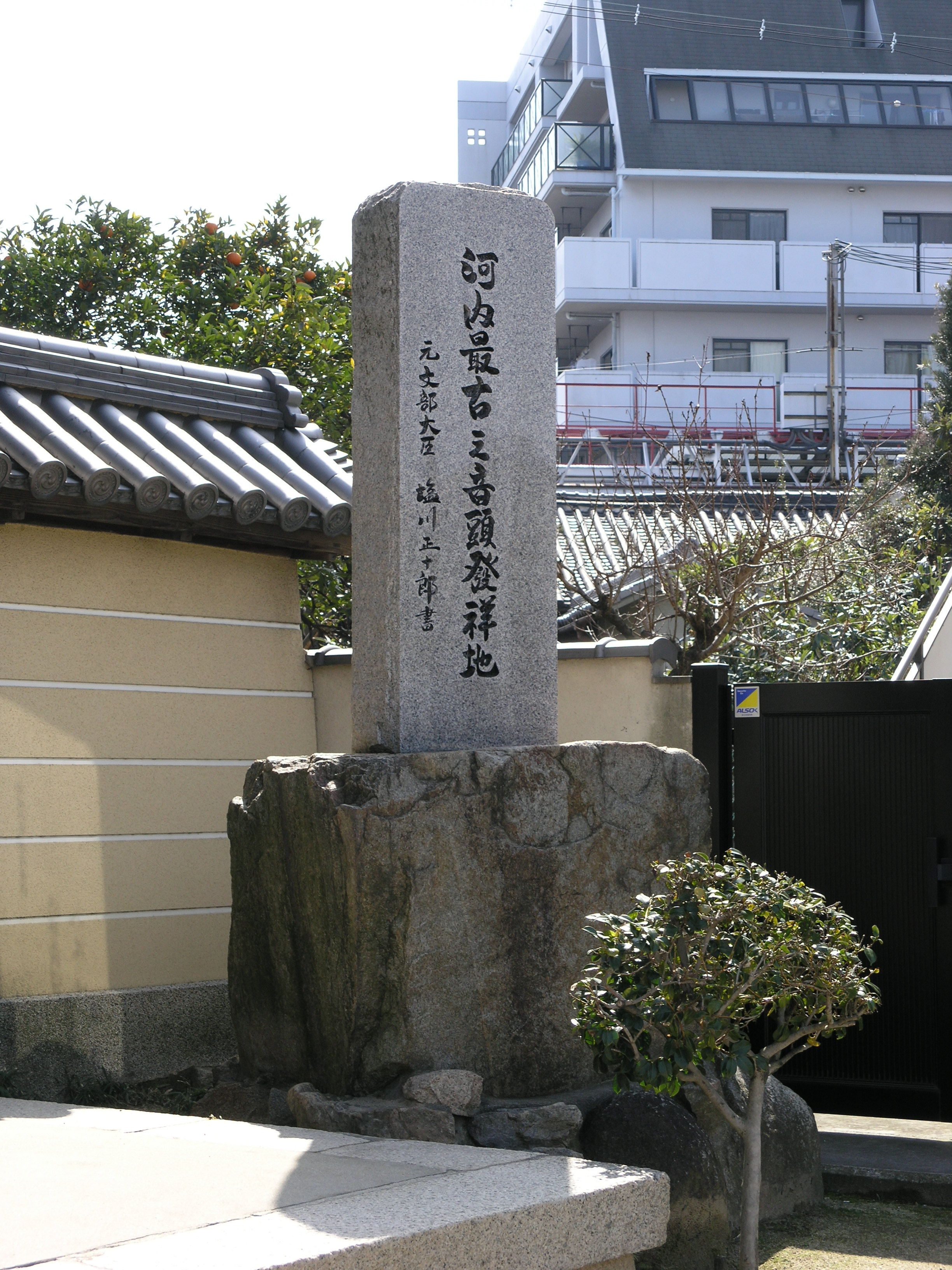 Jōkōji in Yao, Osaka, Japan